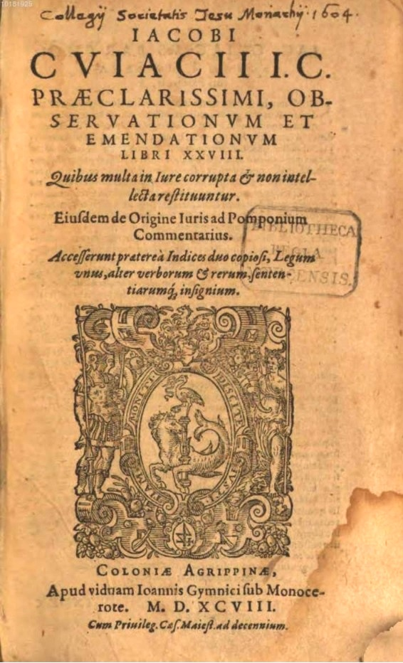 Portada de l'obra "Observationvm Et Emendationvm Libri XXVIII: Quibus multa in Iure corrupta et non intellecta restituuntur" de Jacques Cujas. Coloniae Agrippinae (Colònia): Apud viduam Ioannis Gymnici, 1598.